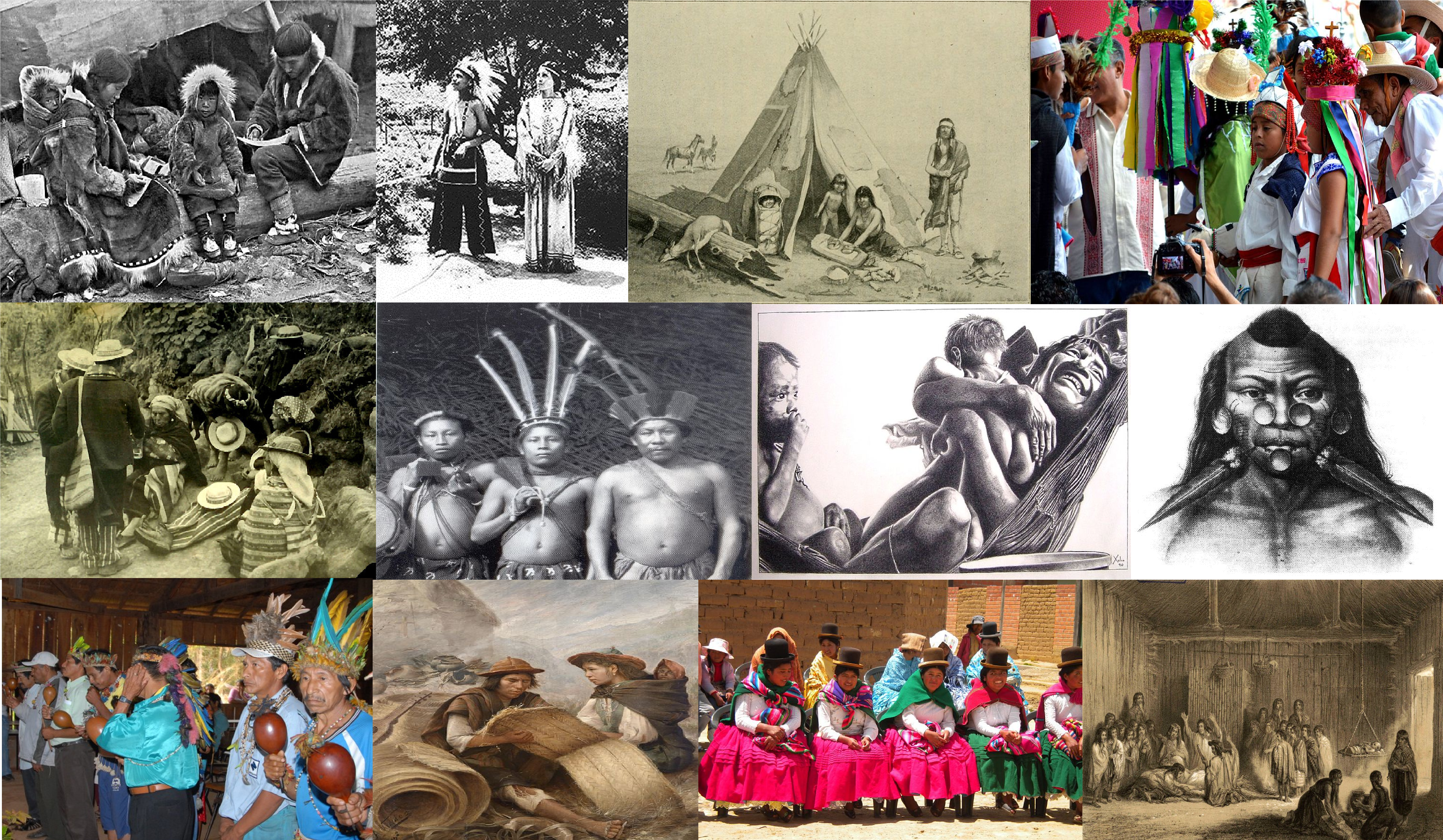 Montaje de algunas tribus amerindias mas conocidas y abundantes